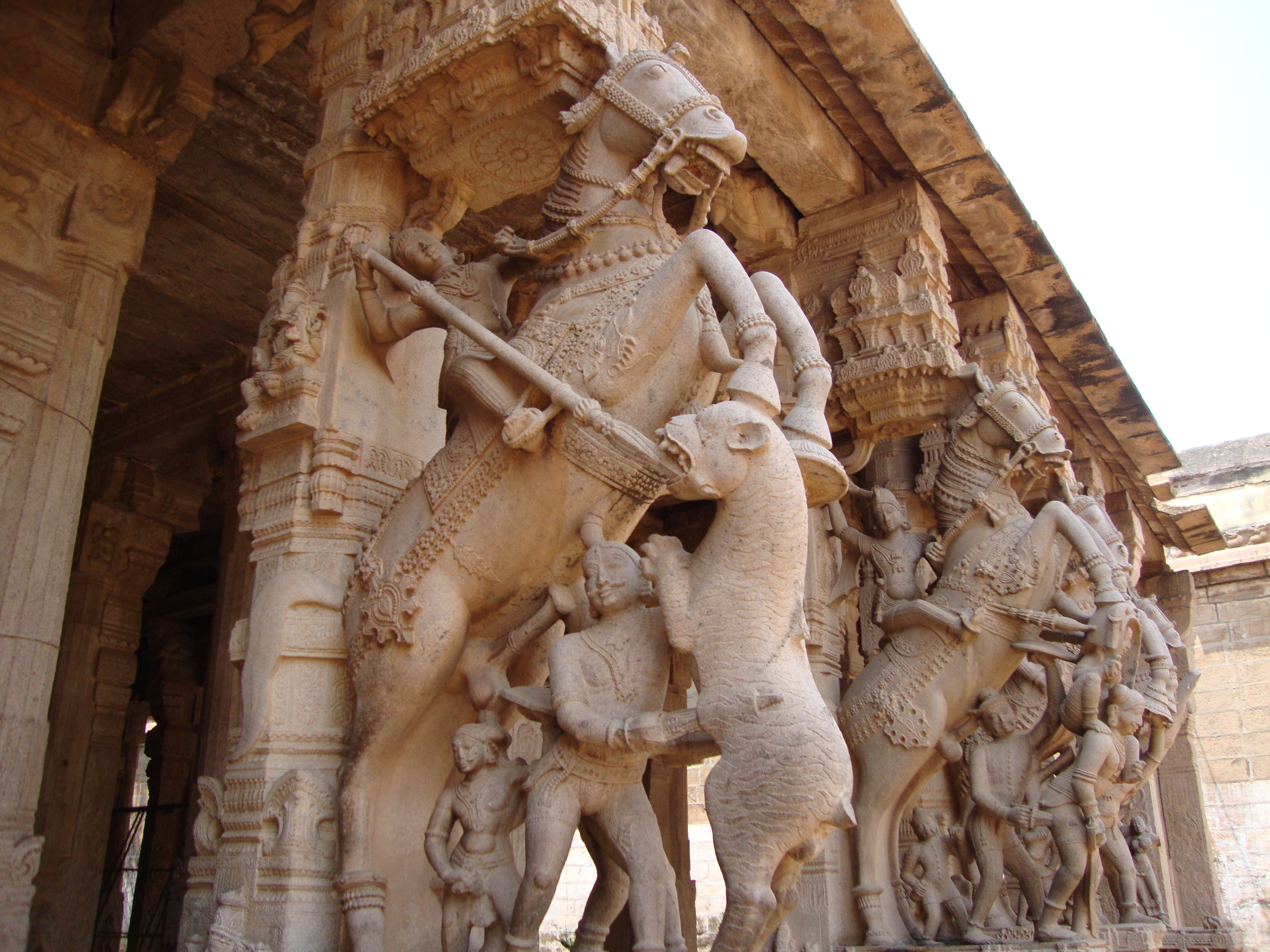 stone art,srirangam temple,tamilnadu